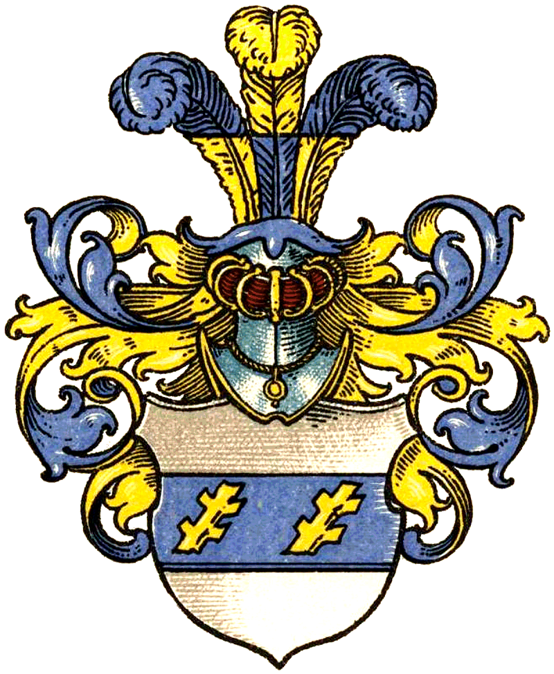 Wappen der von Offen